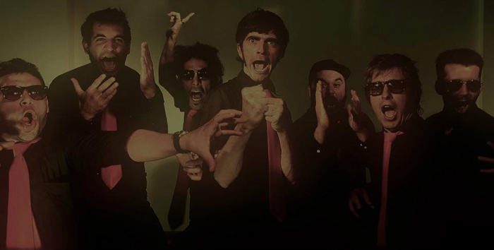 WDK (ultima formación 2007-2012)